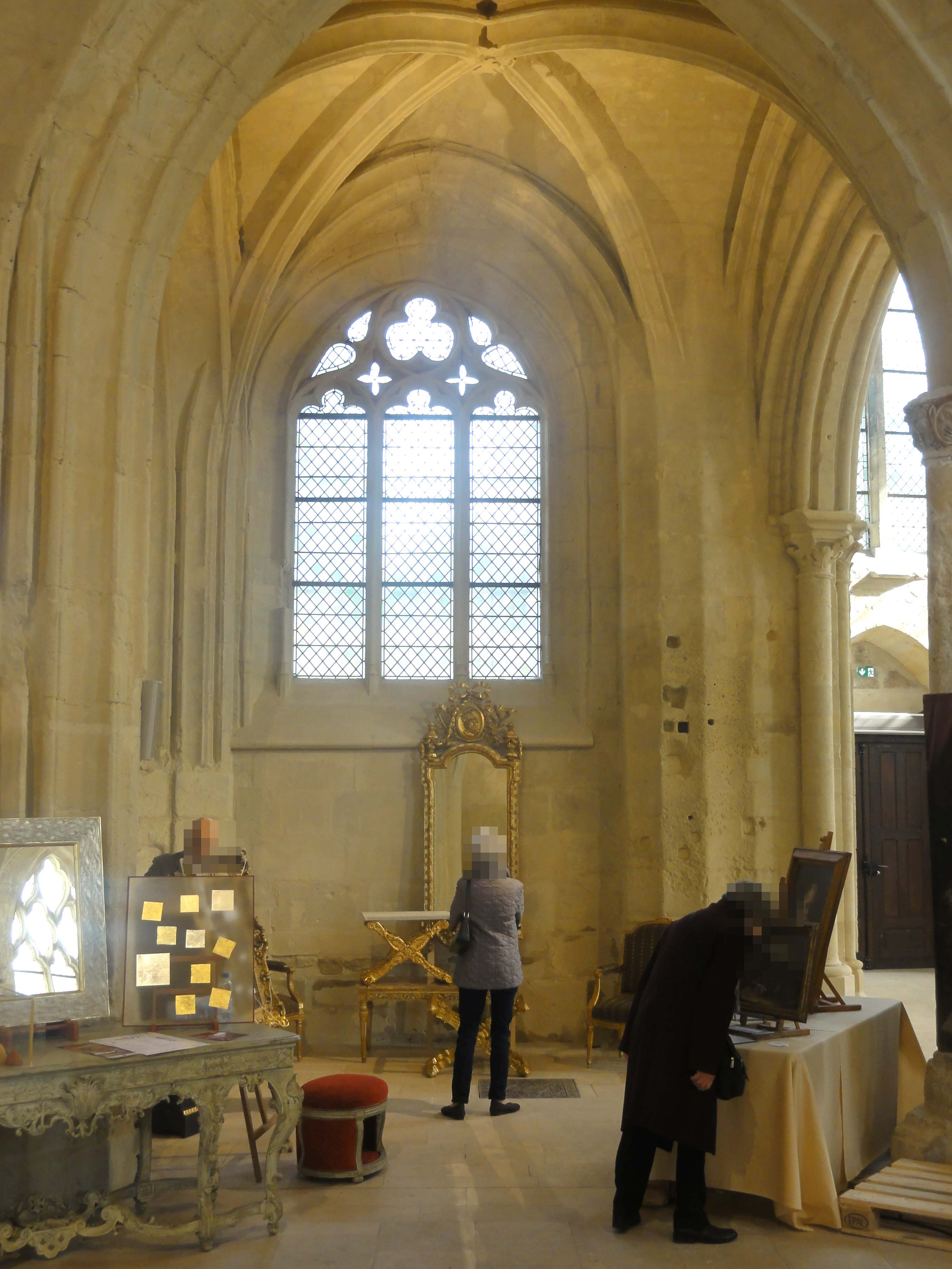 Intérieur de l'église - voir titre.